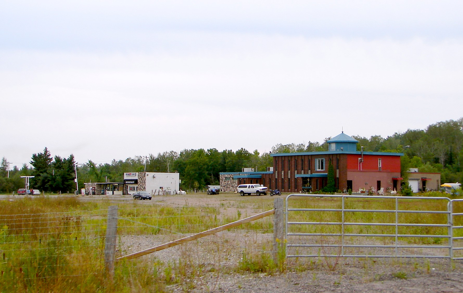 Estaire, Ontario, Canada